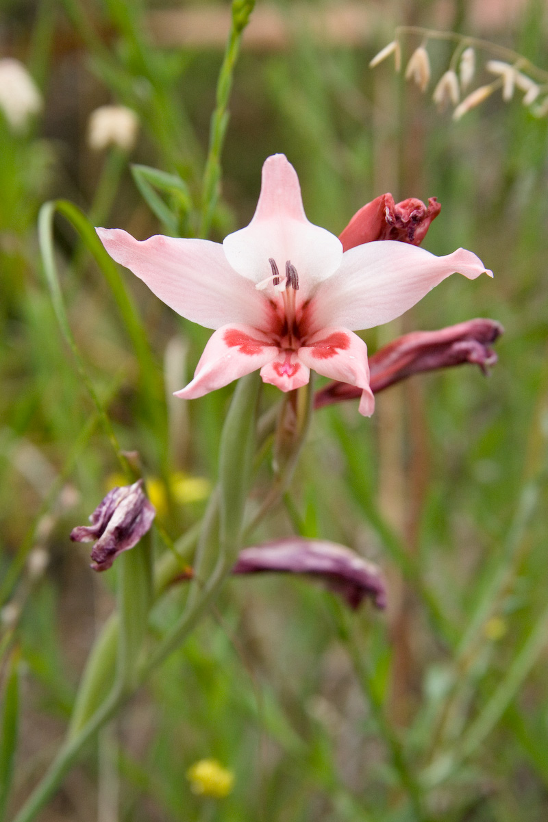 Gladiolus carneus (Painted Lady)